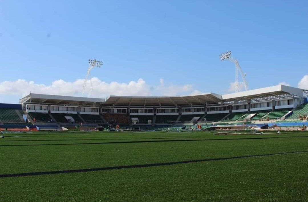 Remodelación del estadio Francisco Carranza Limón a septiembre de 2019